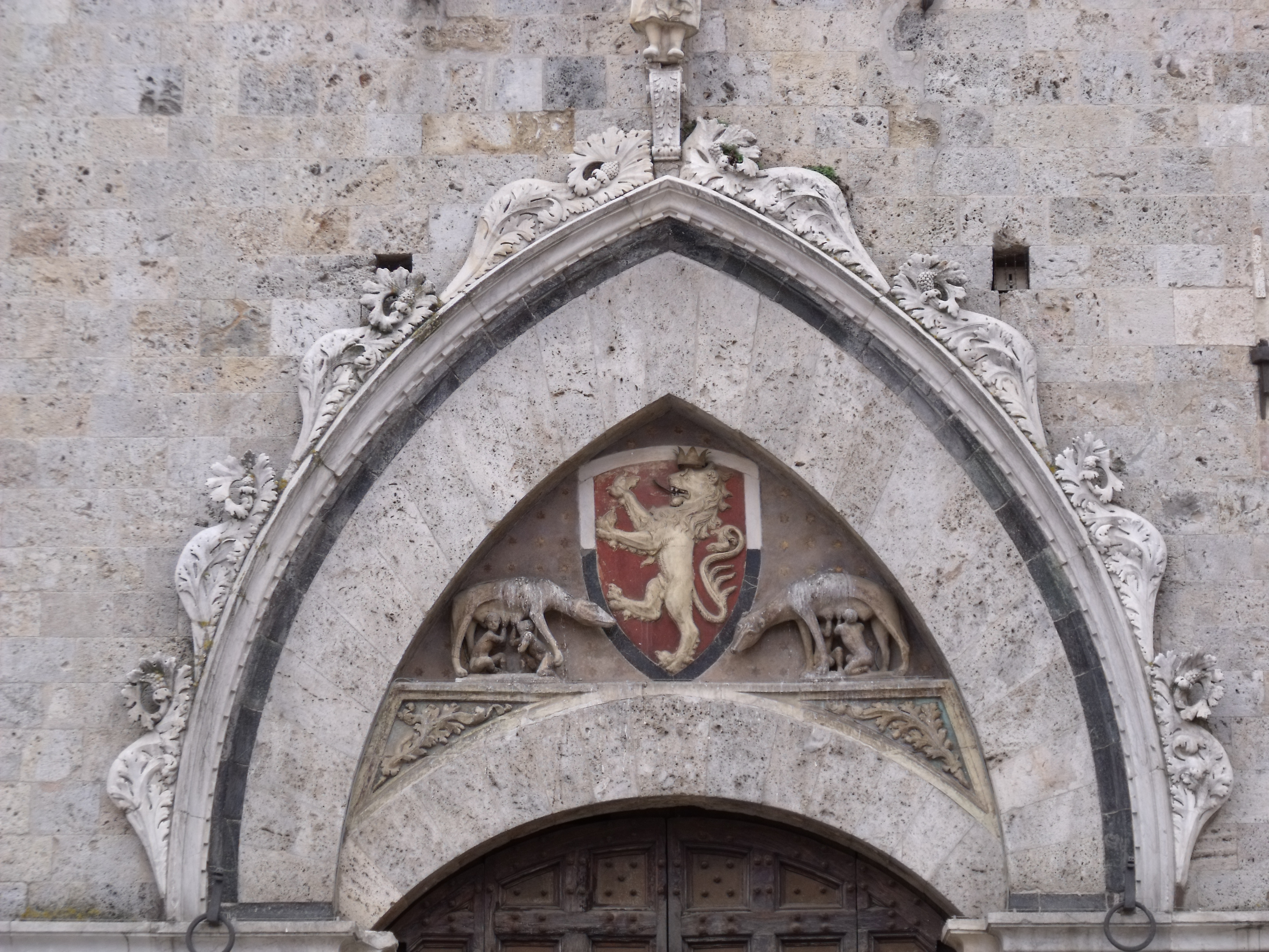 Stemma del Capitano e Lupe romane, Palazzo Pubblico Siena, opera di Agostino di Giovanni